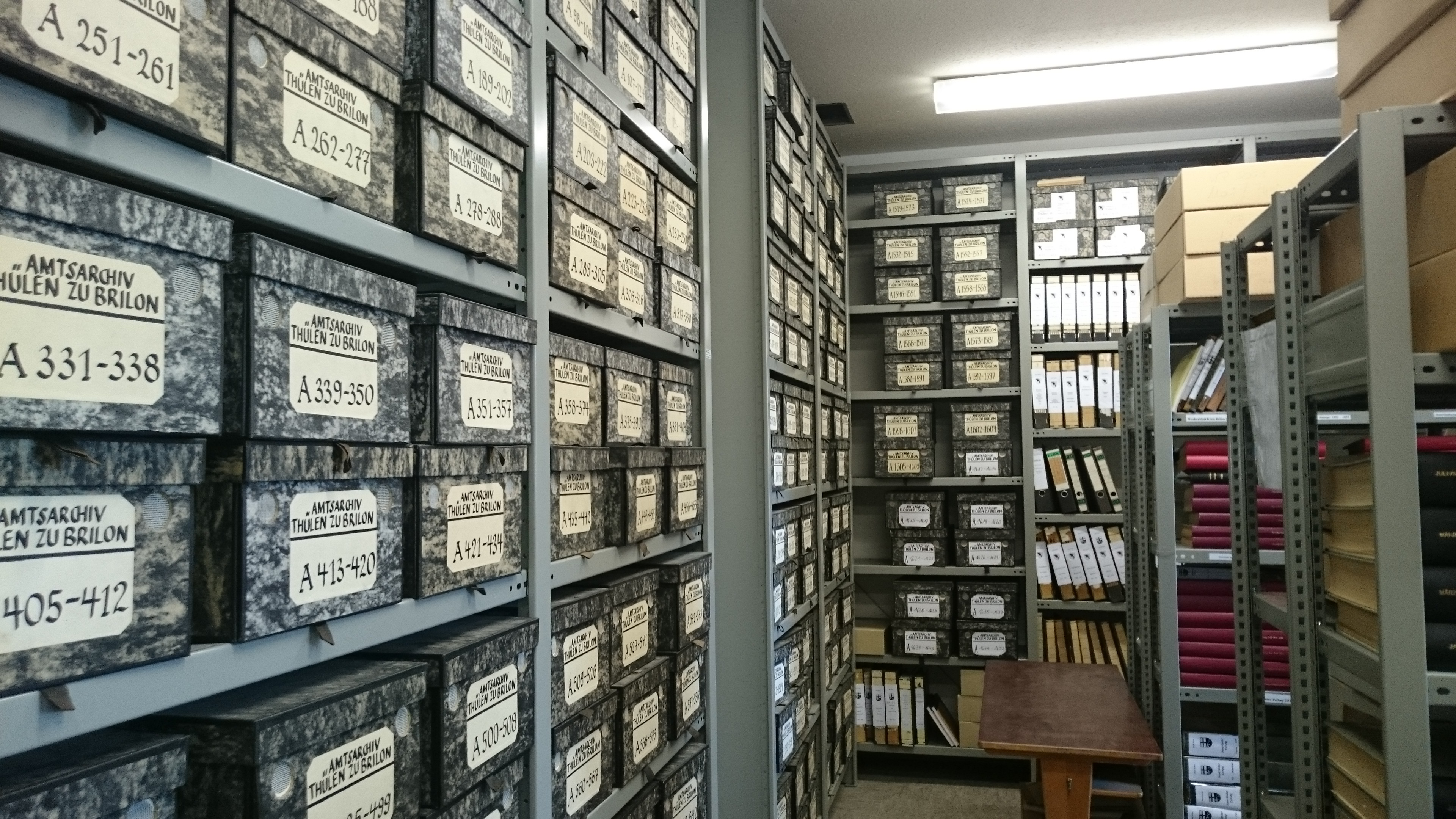 Ausschnitt des Magazins, zu sehen sind die Kartons, in denen der Bestand "Amt Thülen - A" lagert